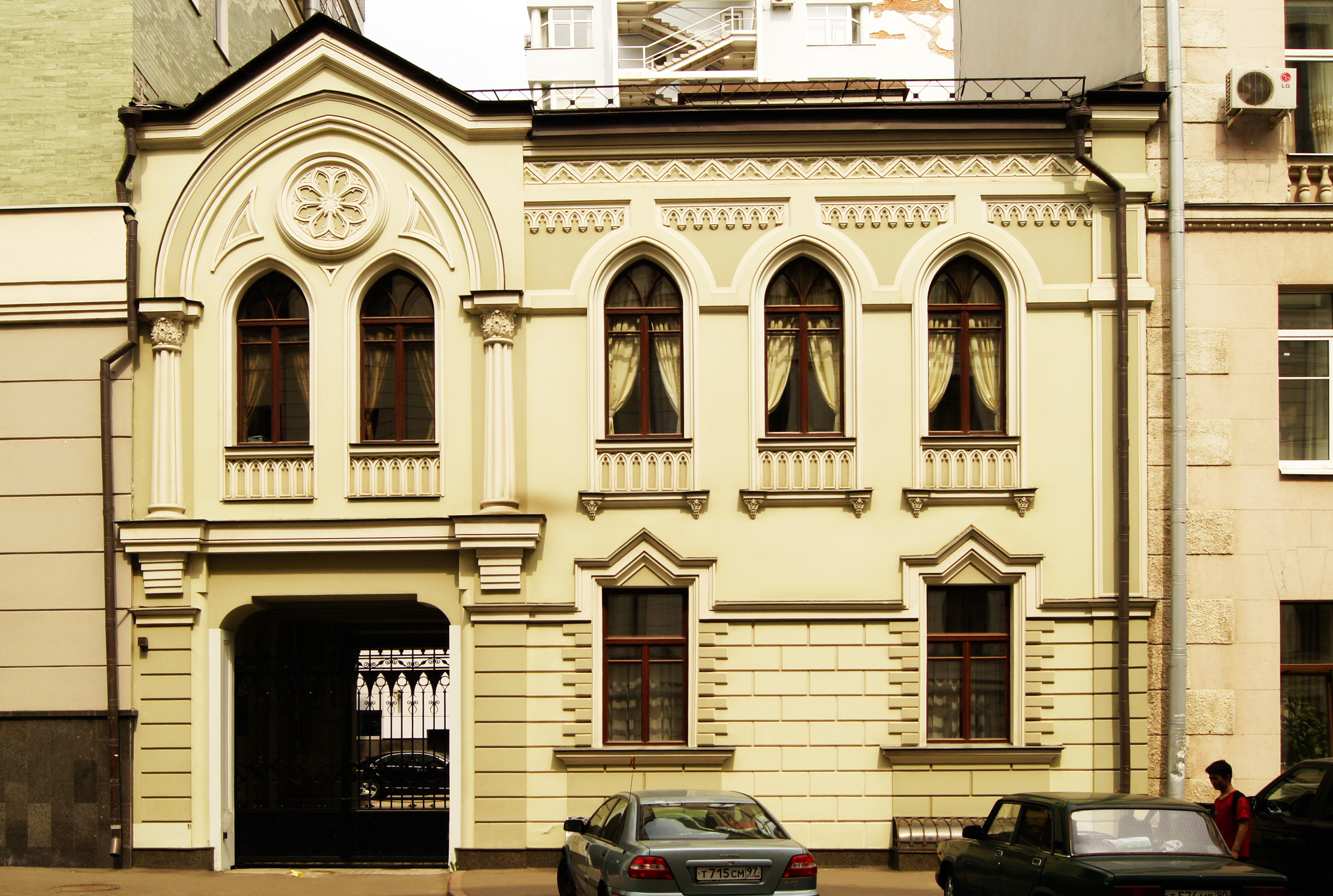 Povarskaya Street Moscow, 28 k 1